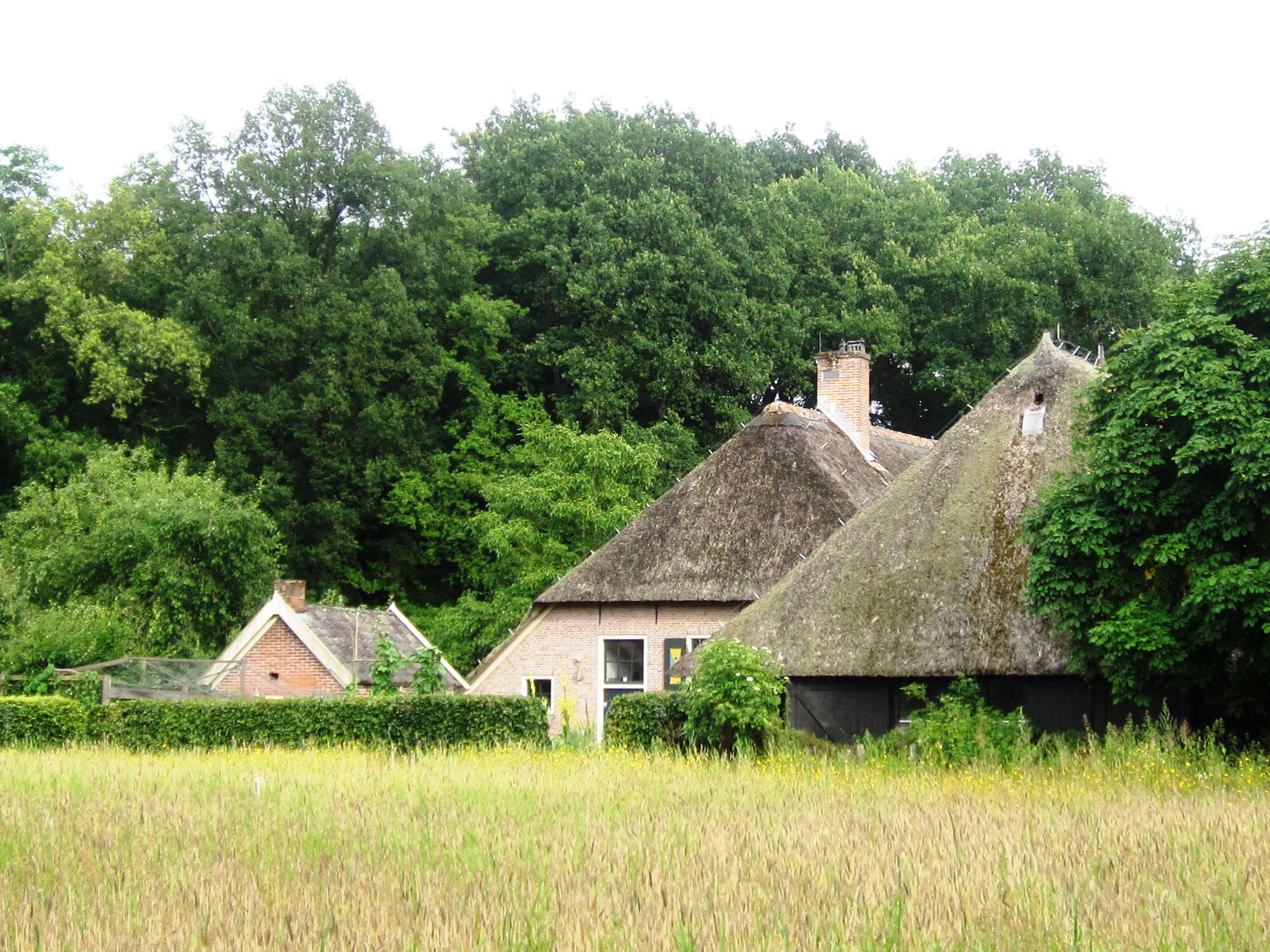 Driehonderd jaar oude voormalige boerderij op het landgoed Nijendal te Olst. Eigendom van Staatsbosbeheer.